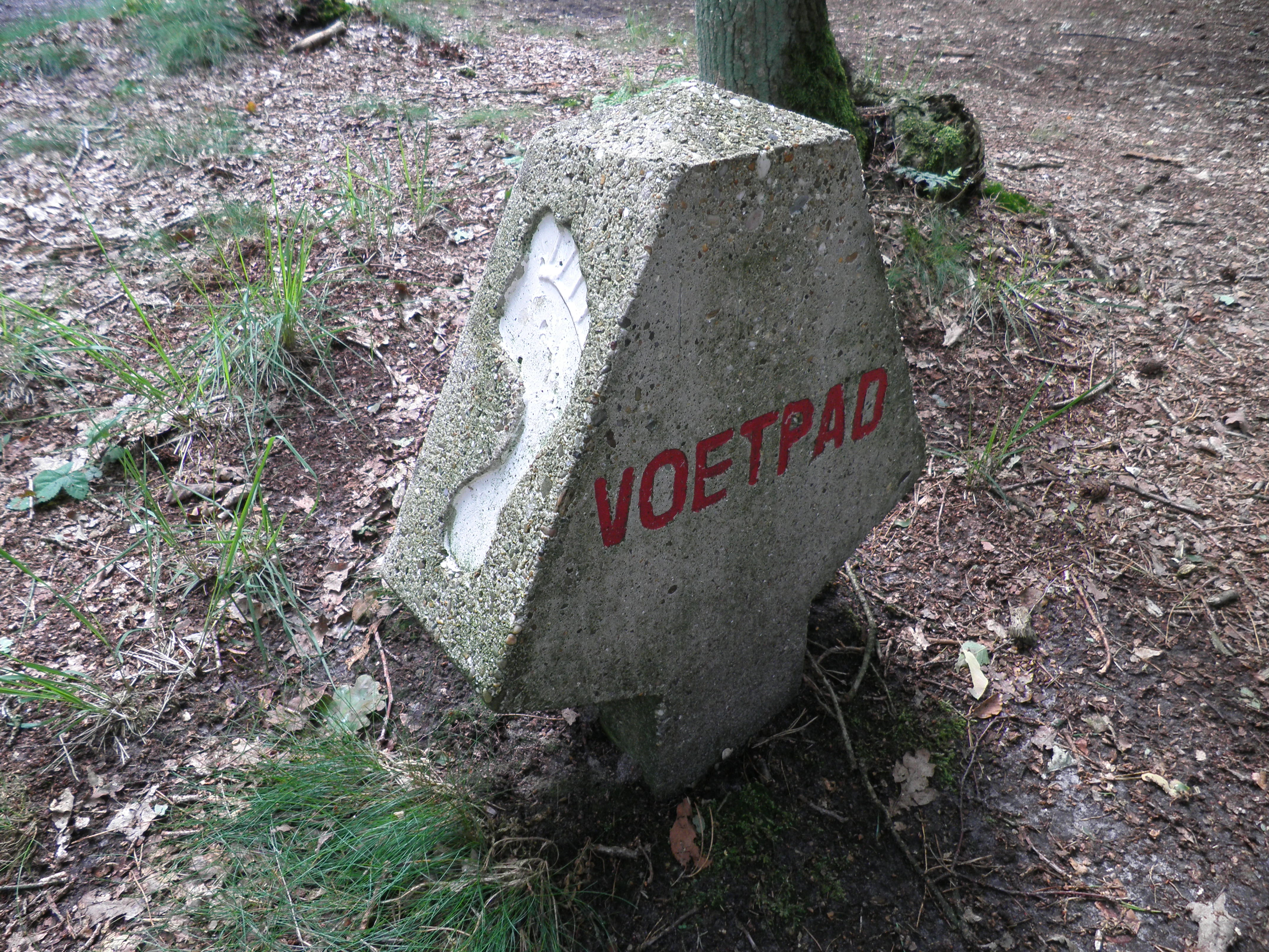 Borne indiquant un sentier pédestre